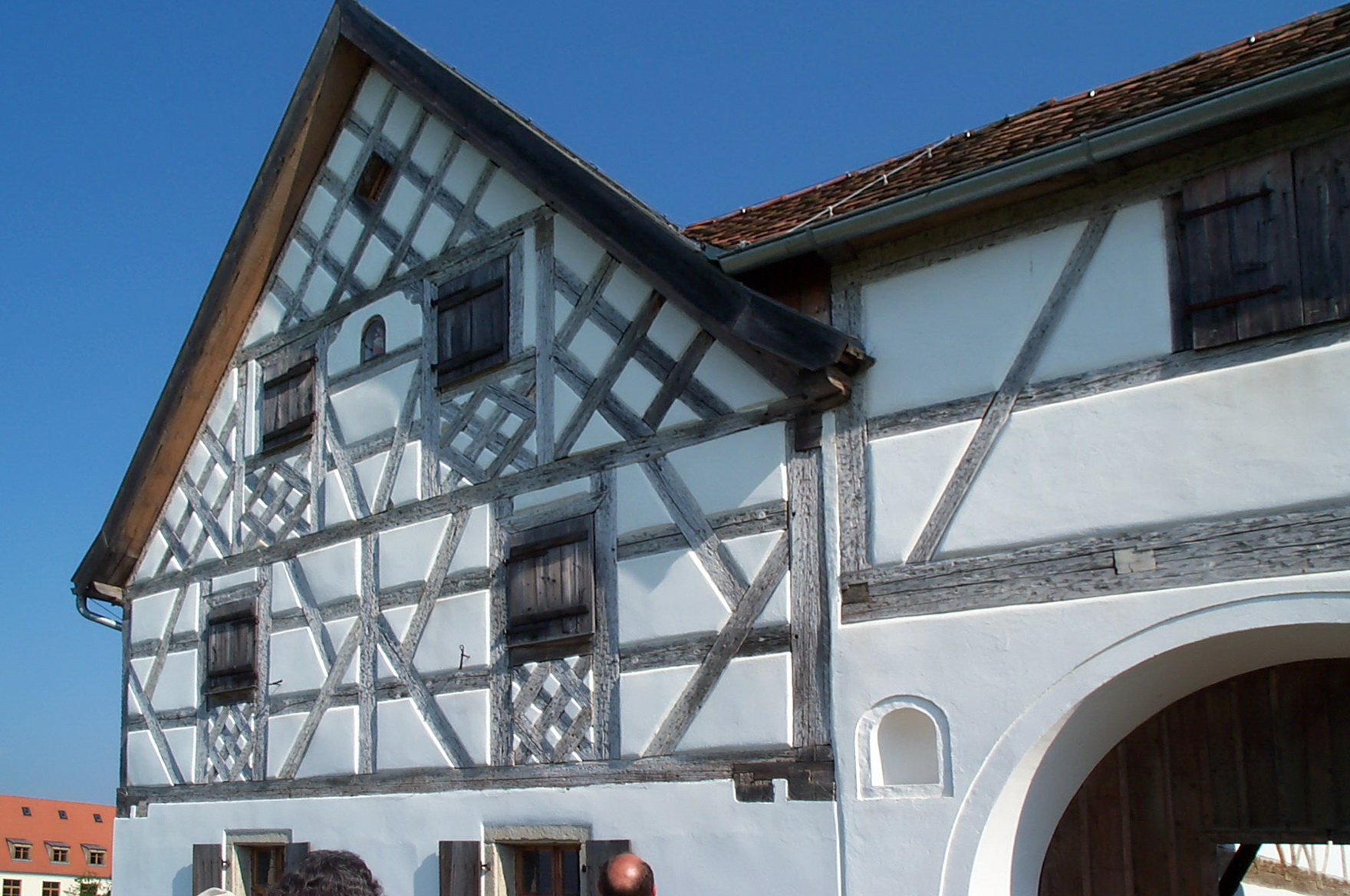 Wohnstallhaus mit Fachwerkgiebel, im Kern wohl 18. Jahrhundert; Fachwerkgiebel an einem Stadel, wohl 18. Jahrhundert; aus der westlichen Oberpfalz transloziert.